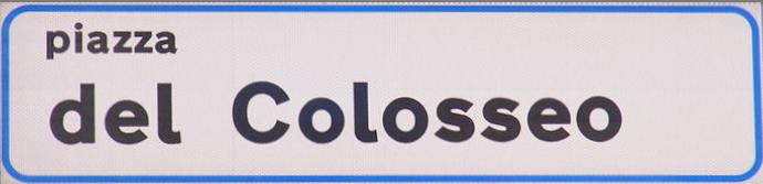 segnale strada comunale extraurbana